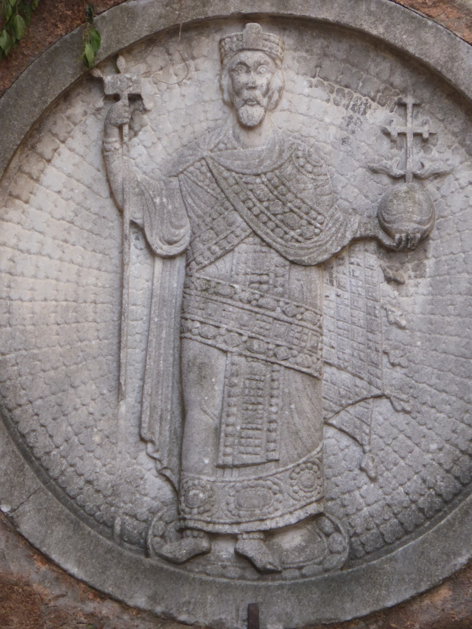 Byzantinische Kaiserdarstellung